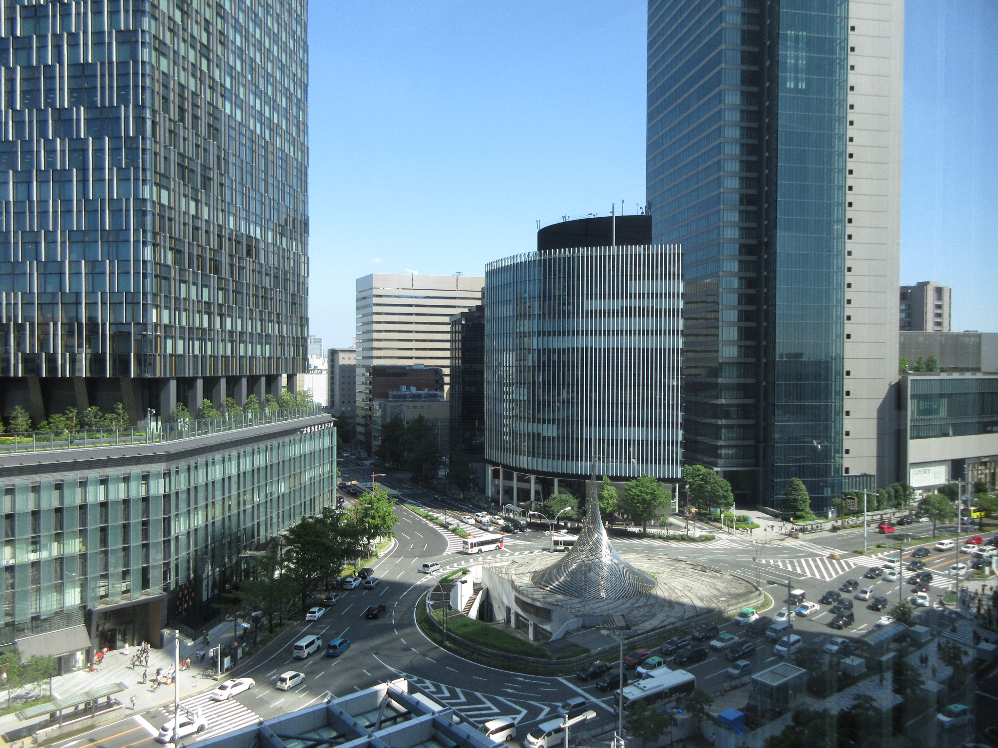 左から、大名古屋ビルヂング、名古屋ビルディング、ミッドランドスクエア